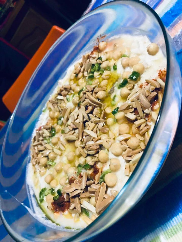 صورة لصحن فتة مصنوع من الخبز و الحمص ومزين بطريقة أردنية